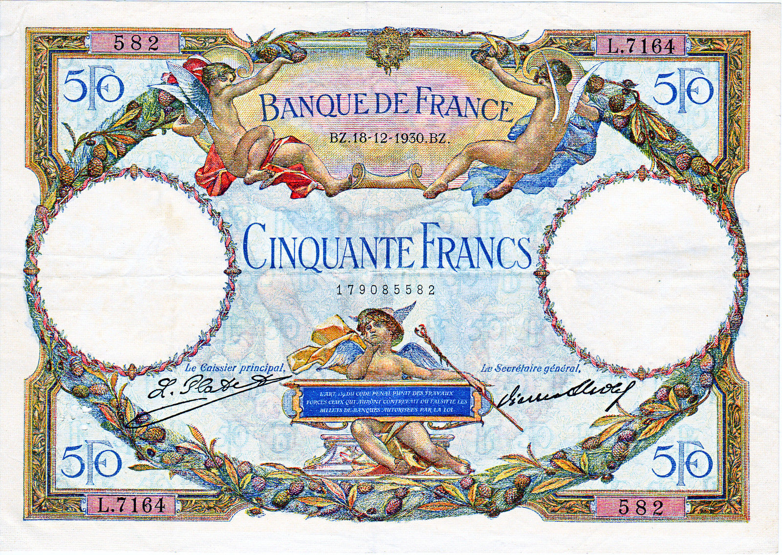 50 francia frank 1930.12.18. A neves bankjegytervező, Luc Olivier Merson (1846-1920) alkotása. Mérete: 170 X 123 mm.